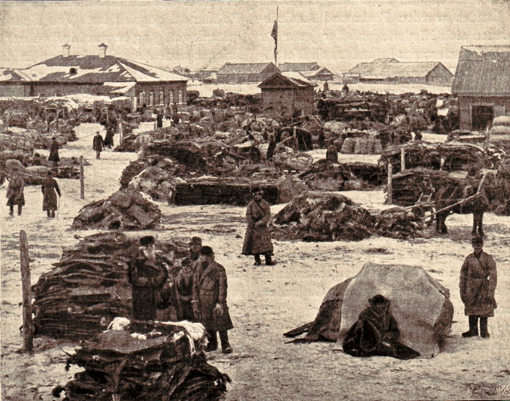 Fur market in Irbit (part of dump) / Ein Teil des Pelzhandelsplatzes von Irbit (Umsatz um 1900: 3.000.000 Rubel)